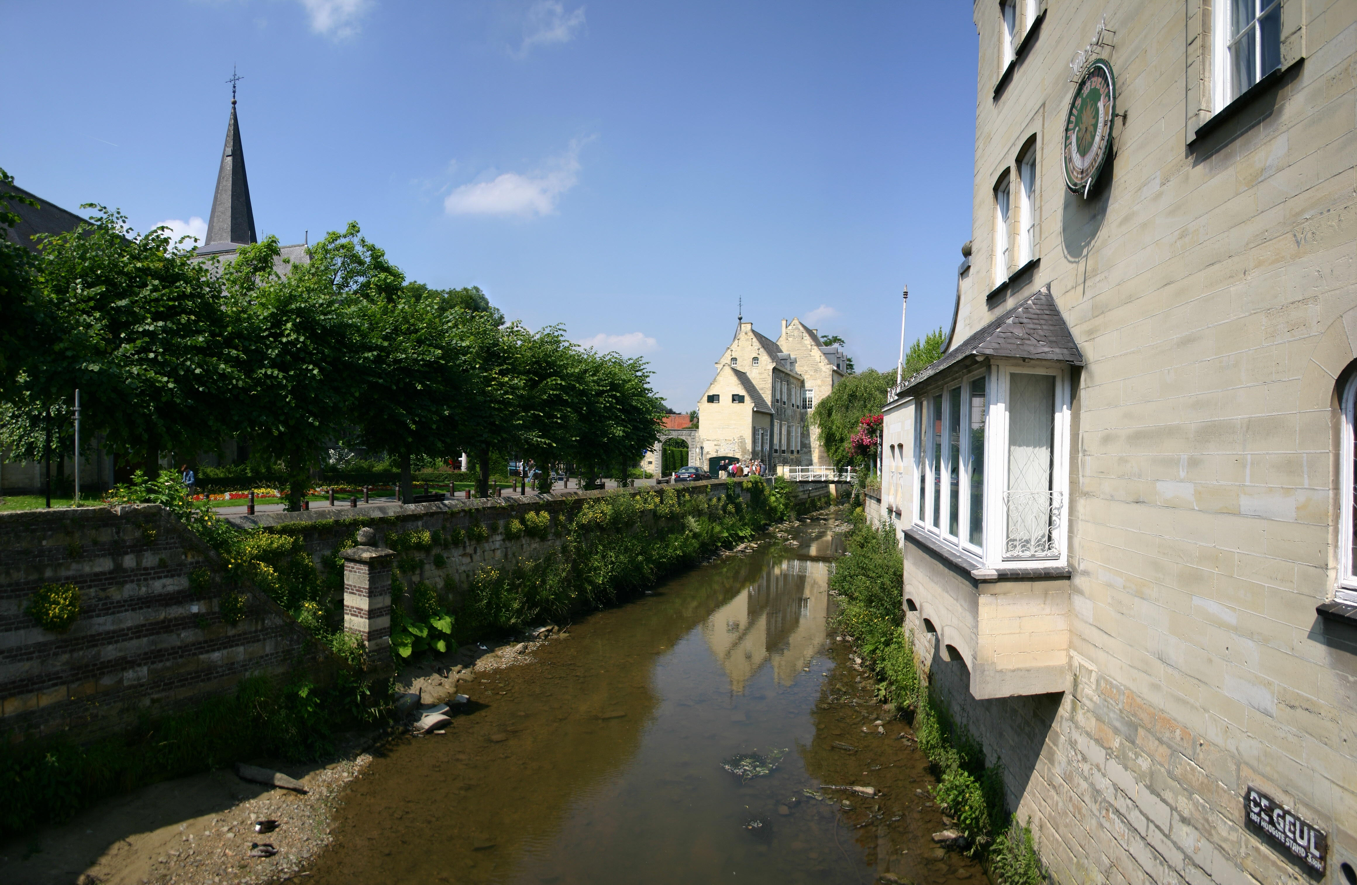 De Geul en Kasteel den Halder, Valkenburg